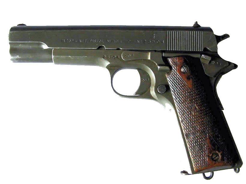 Kongsberg Colt - Norwegian M1914